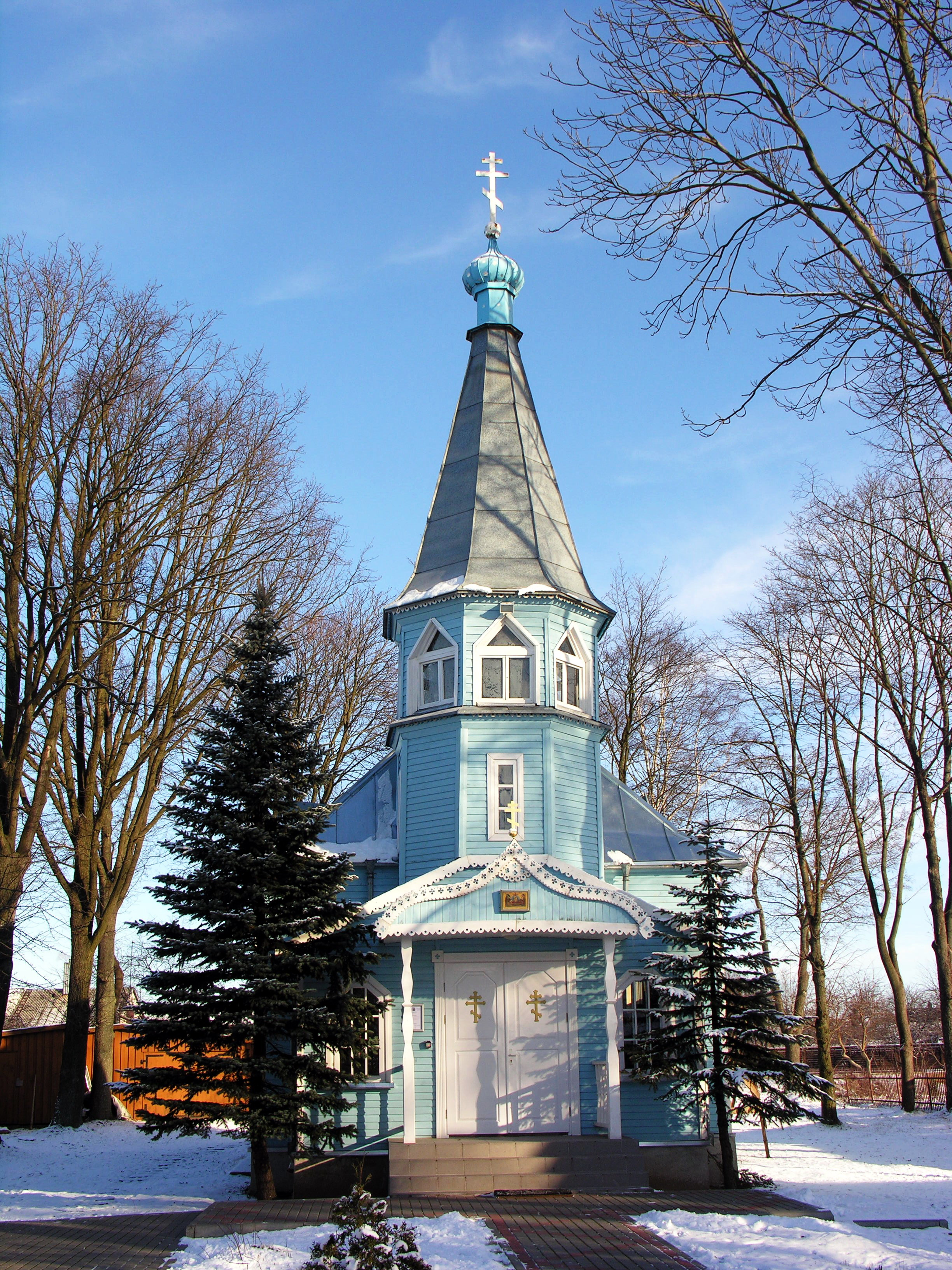 Mažeikių Šventosios Dvasios cerkvė, past. 1894 m.